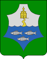 Герб Осташкова (1970 год), Тверская область